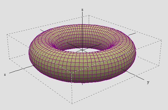 Tore ouvert Équation paramétrique : x = (5+2*cost)*cosu y = (5+2*cost)*sinu z = 2*sint Image réalisée par mes soins grâce au logiciel gratuit Winplot.